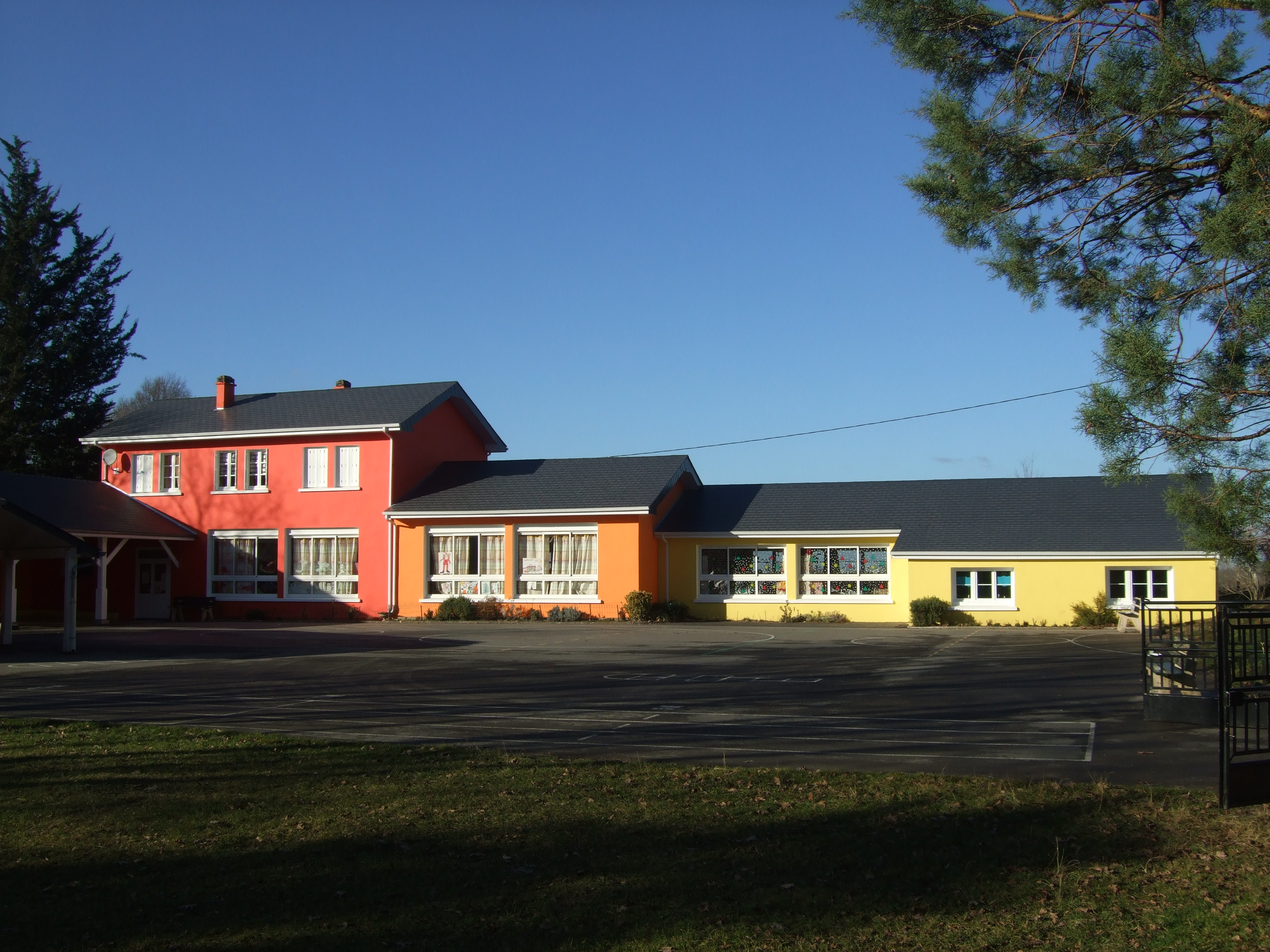 Ecole municipale d Eysus